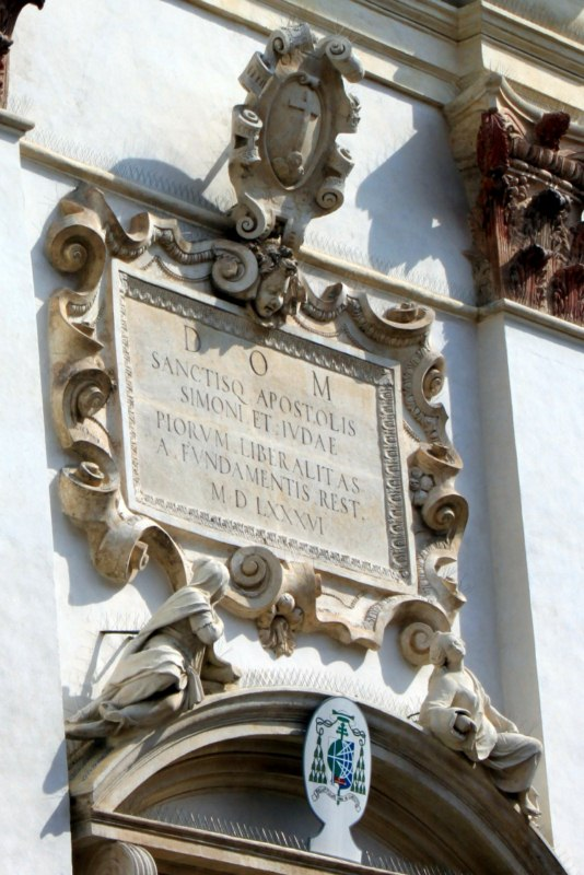 Chiesa di San Gaetano a Padova